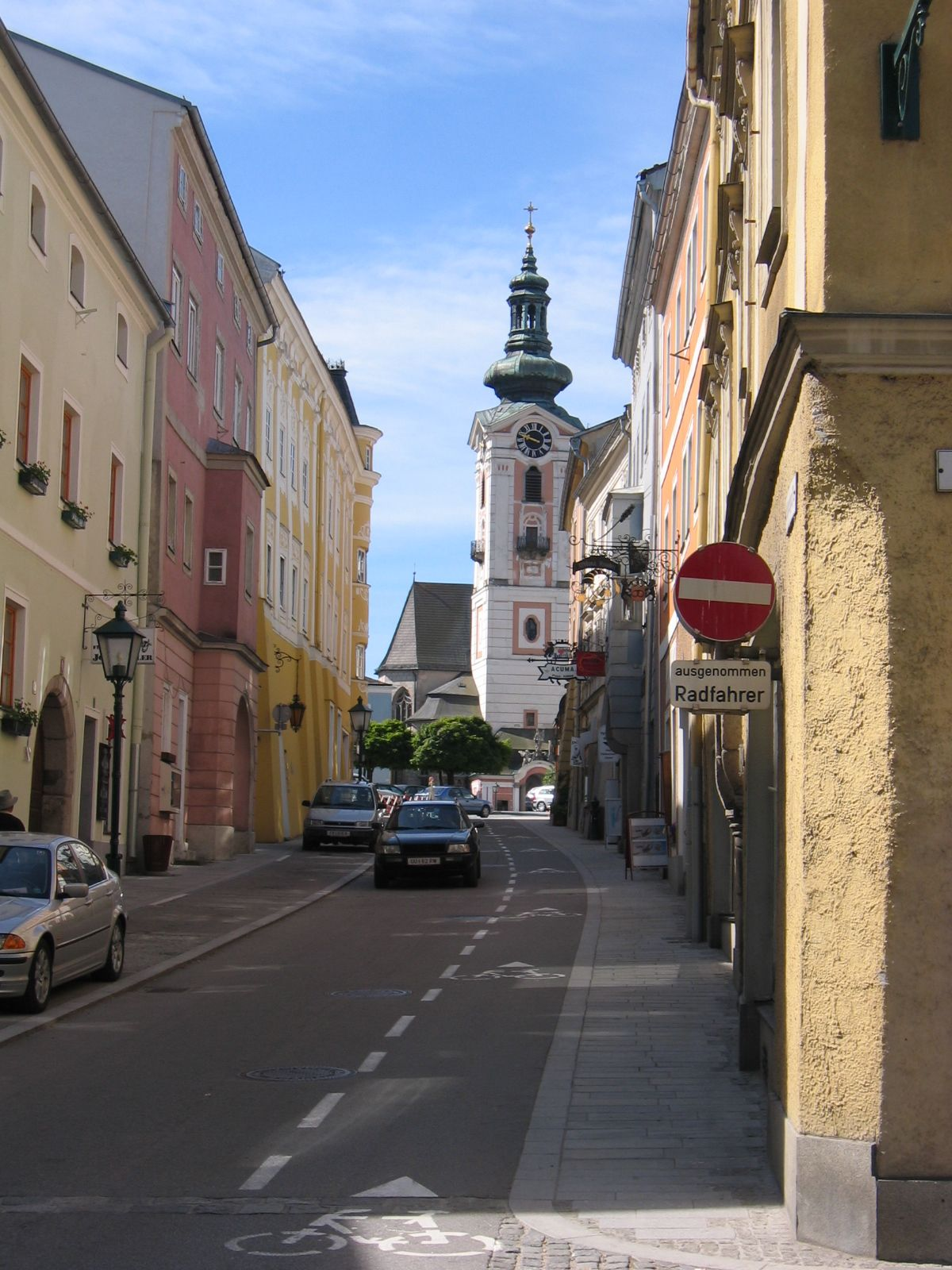 Böhmergasse in Richtung Kirchturm (= Süden)